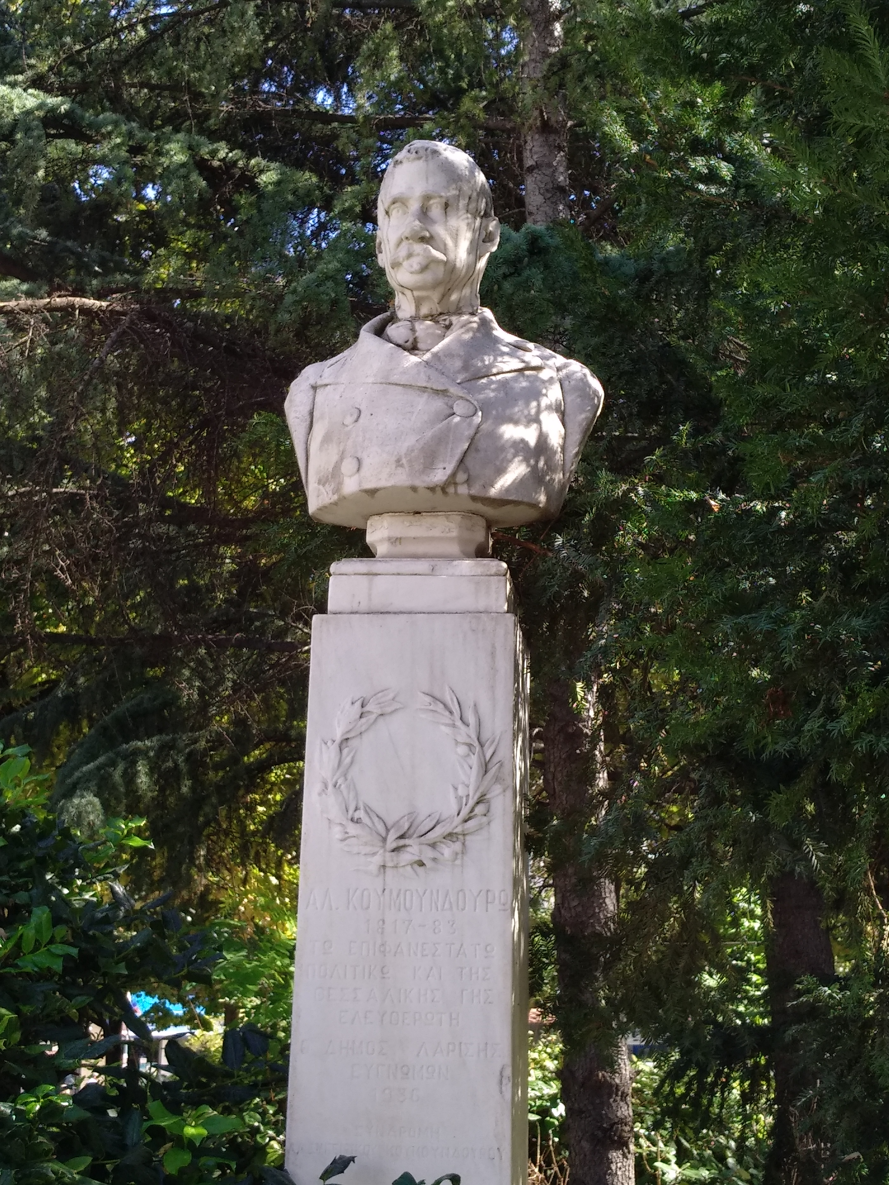 Λάρισα_κεντρικη πλατεία_προτομη Κουμουνδούρου_1